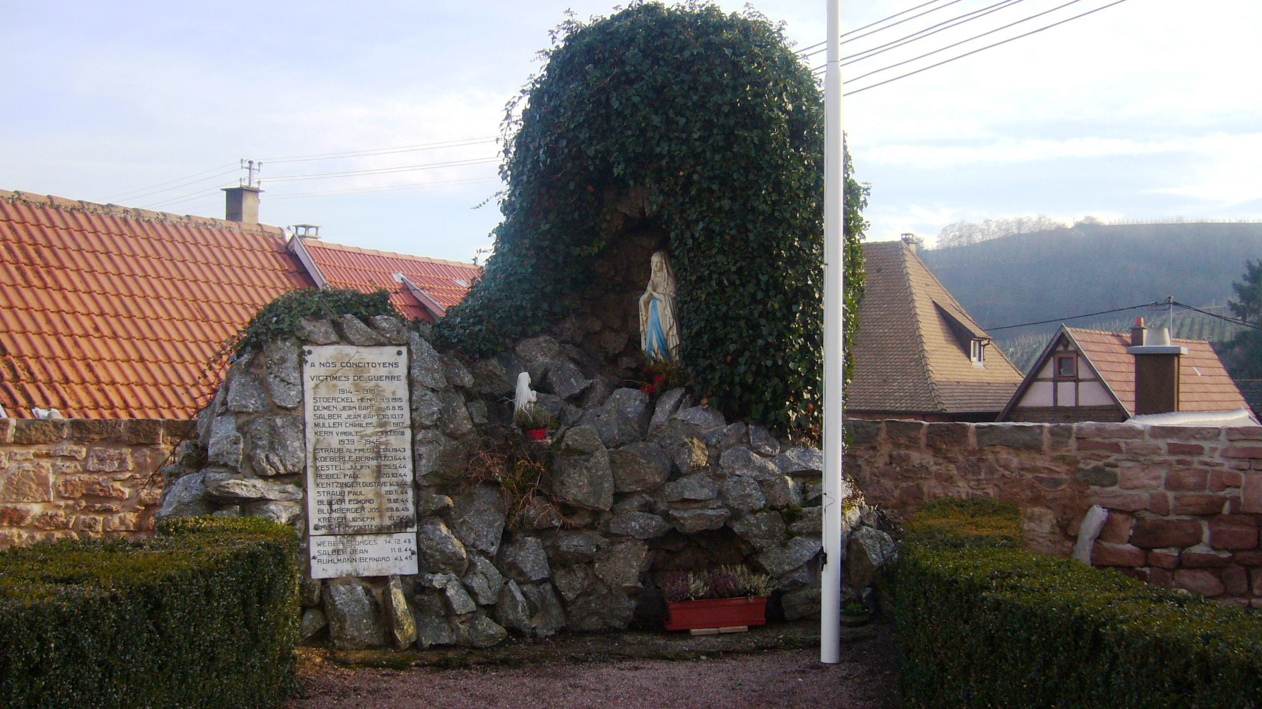 Réplique de grotte de Lourdes à Rodern.